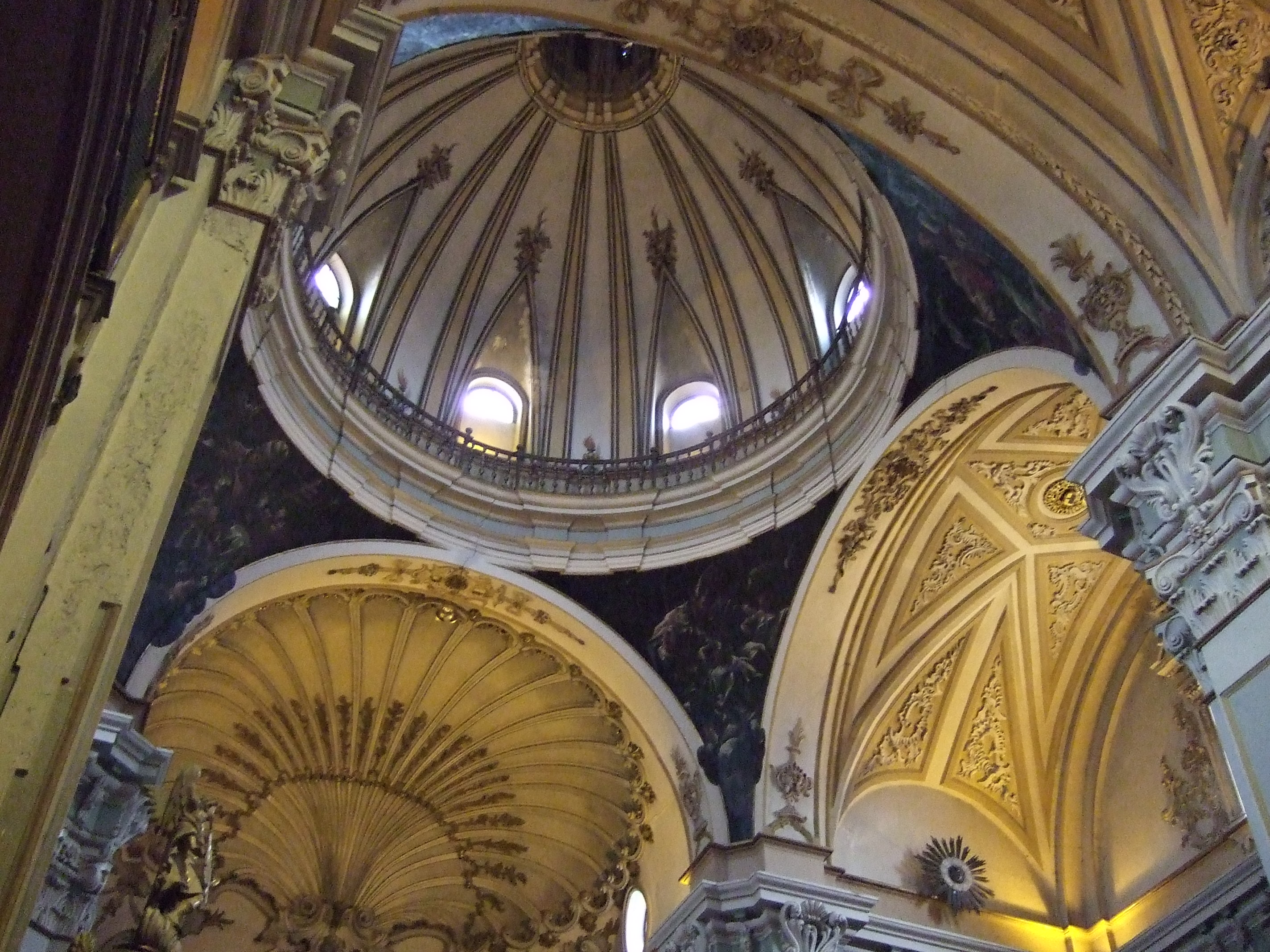 Calatayud - San Juan el Real - Cúpula central - Pechinas pintadas por Francisco de Goya y Lucientes con 20 años.